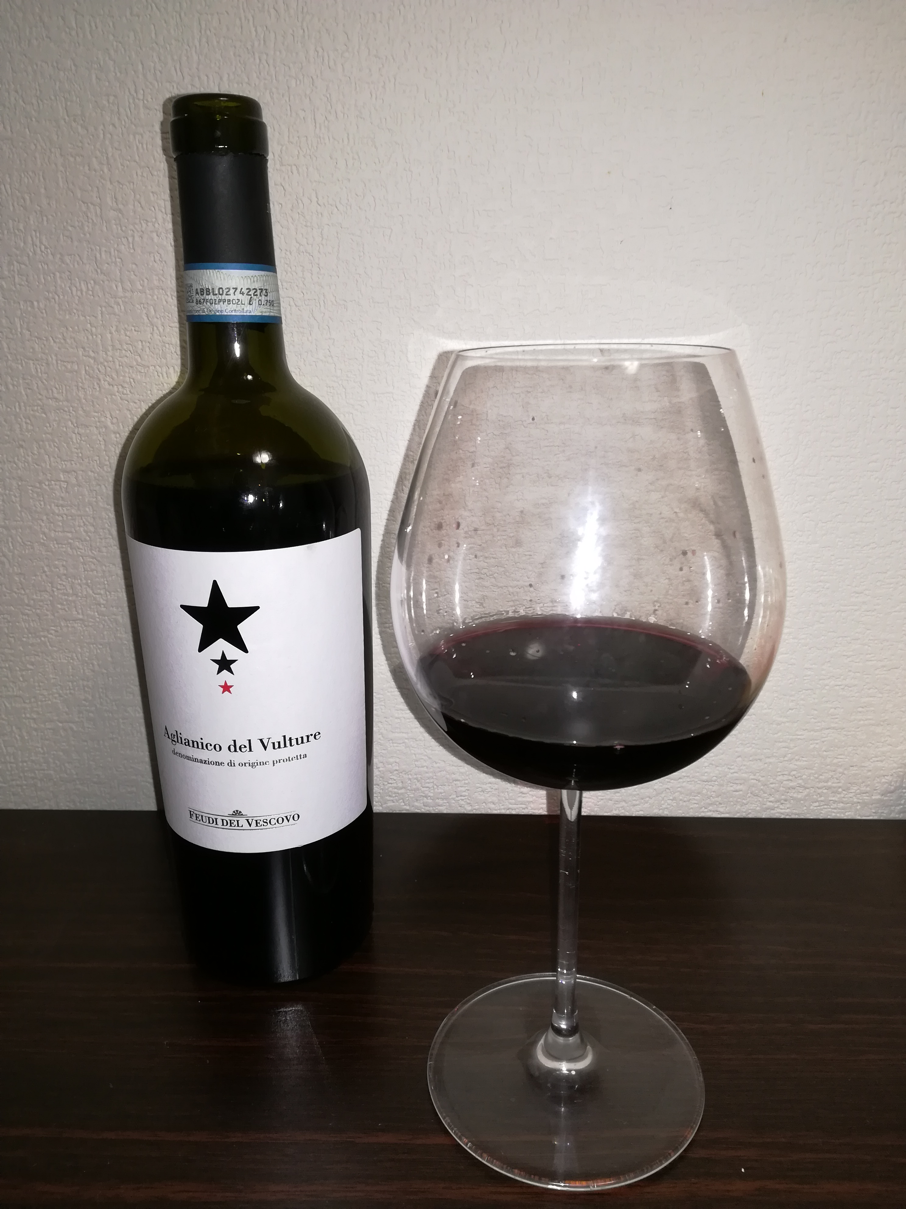 2016年産のDOCワイン、アリアニコ・デル・ヴルトゥレをグラスに注いだ写真。2018/7/23撮影。